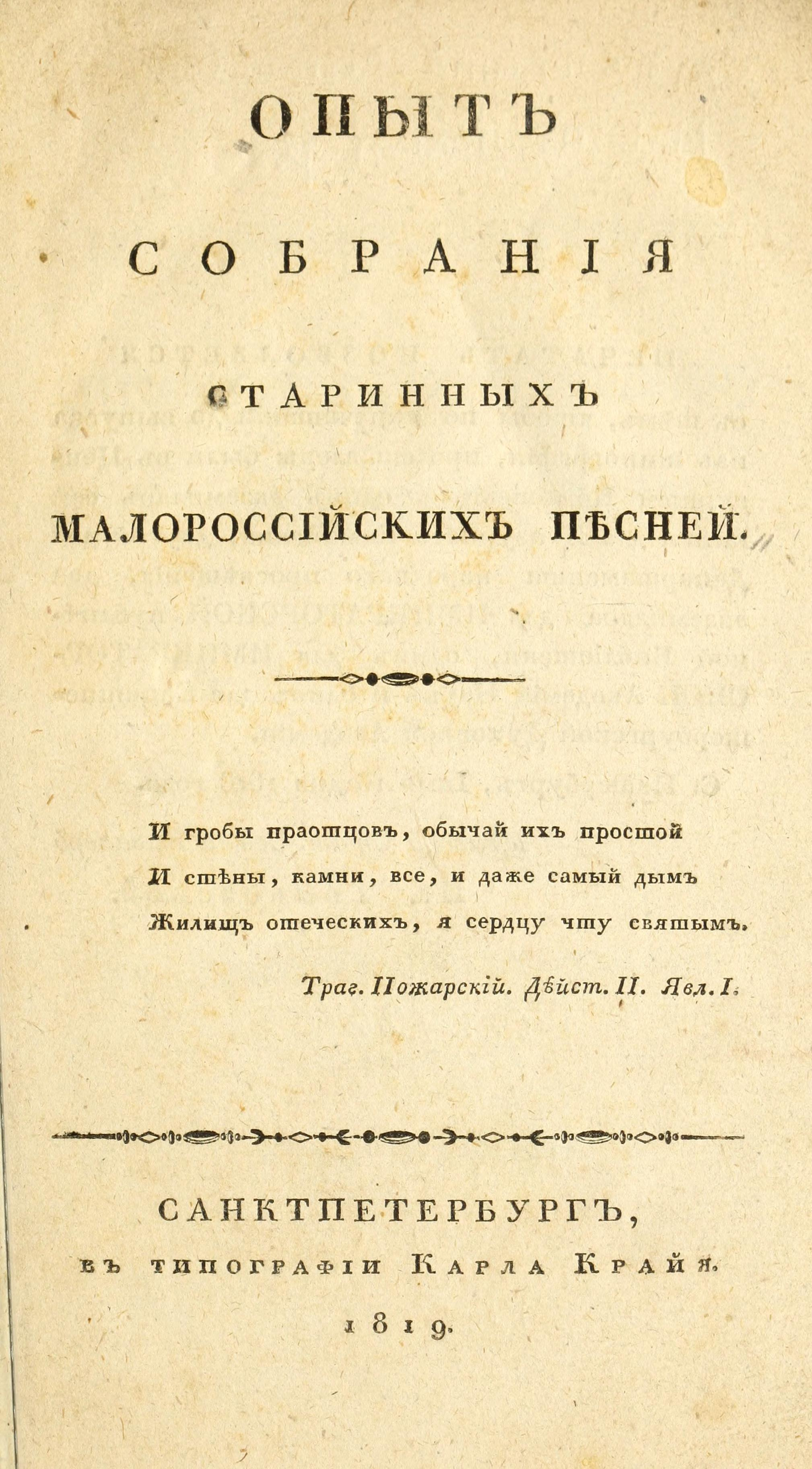 Обкладинка книги: Цертелев Н. А. Опытъ собранія старинныхъ малороссійскихъ пѣсней. 1819